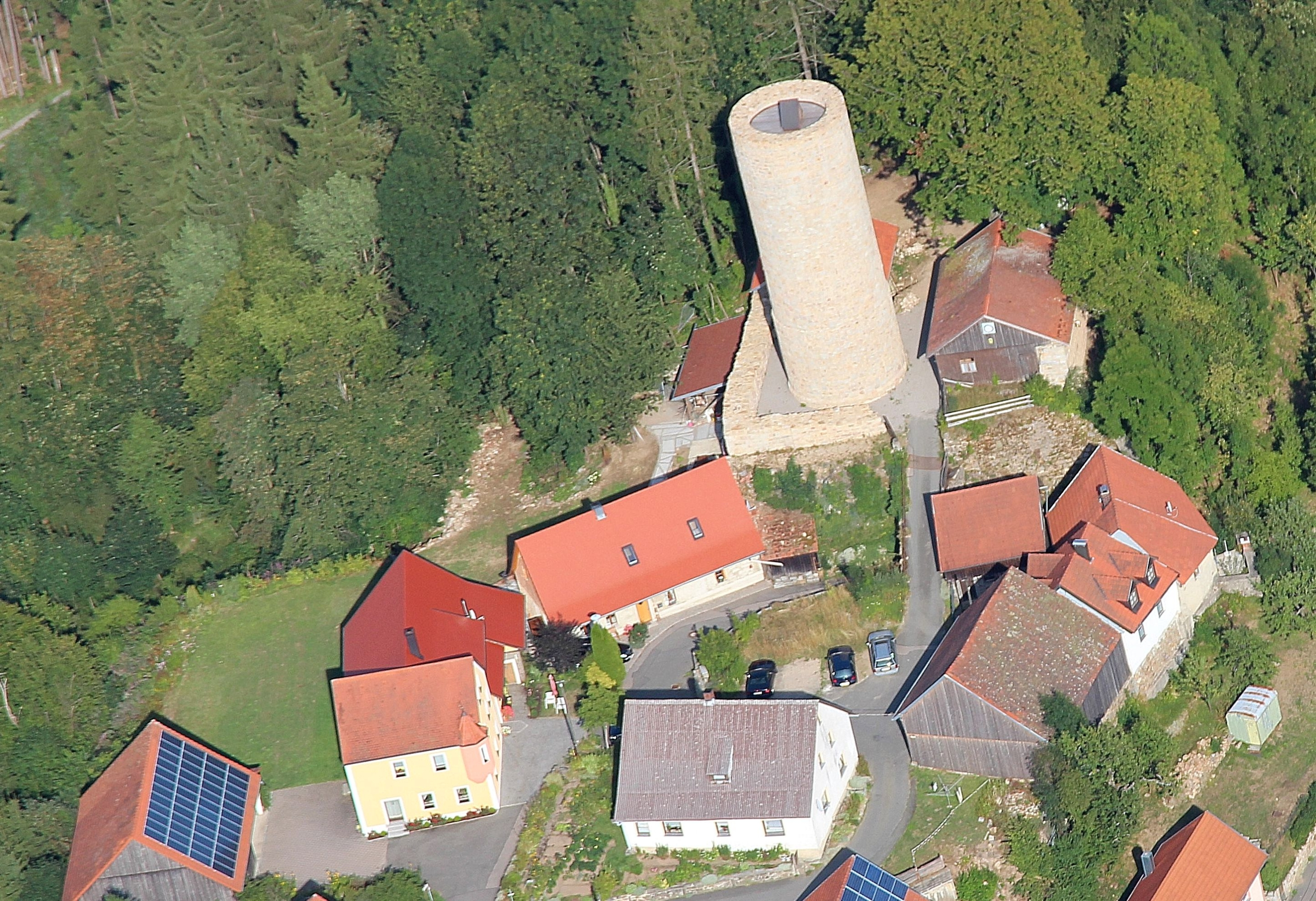 Burgturm, Thanstein, Landkreis Schwandorf, Oberpfalz, Bayern